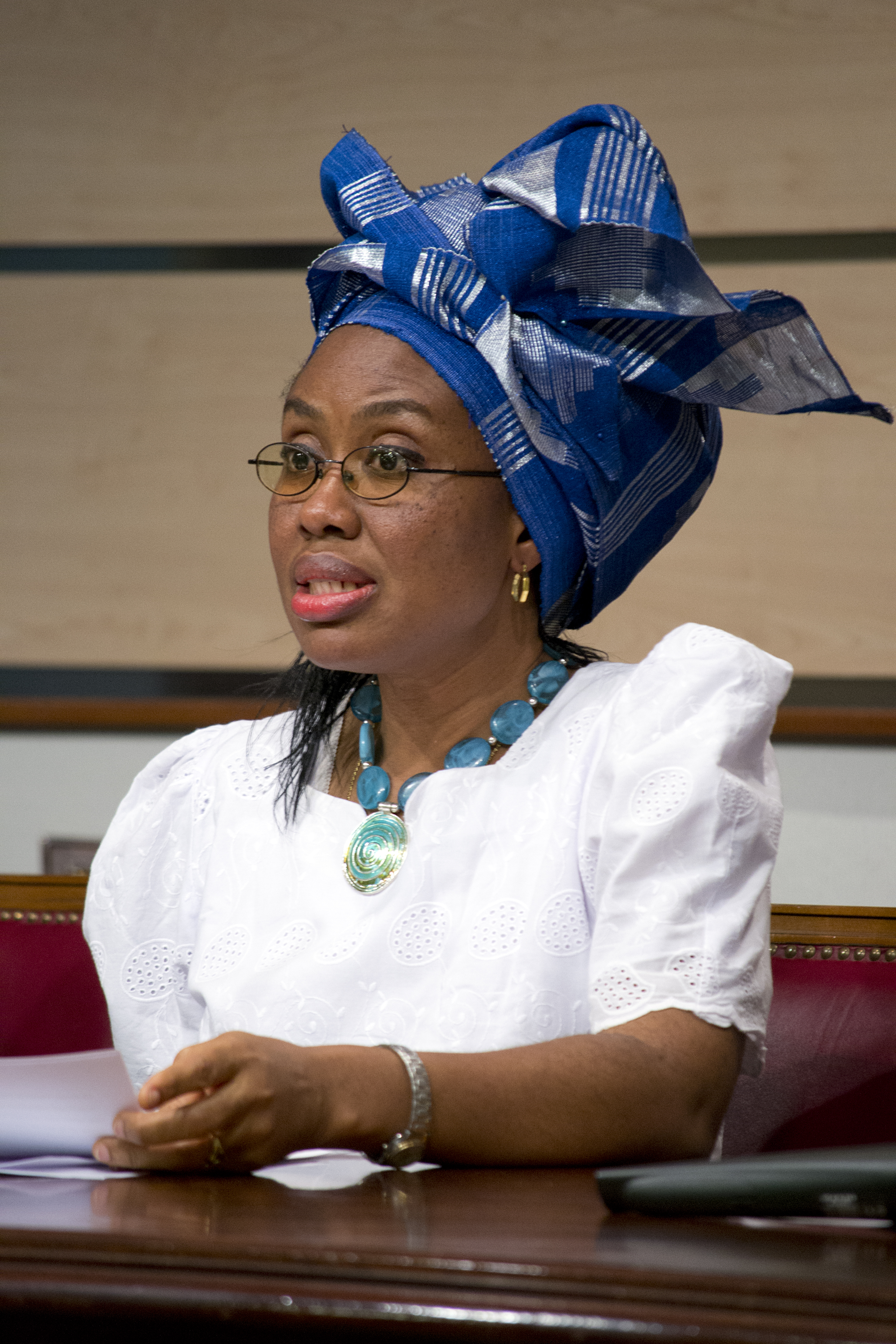 L'Economista Ezinne Ukagwu fou el Premio Harambee 2012 a la promoció i igualtat de la dona africana.